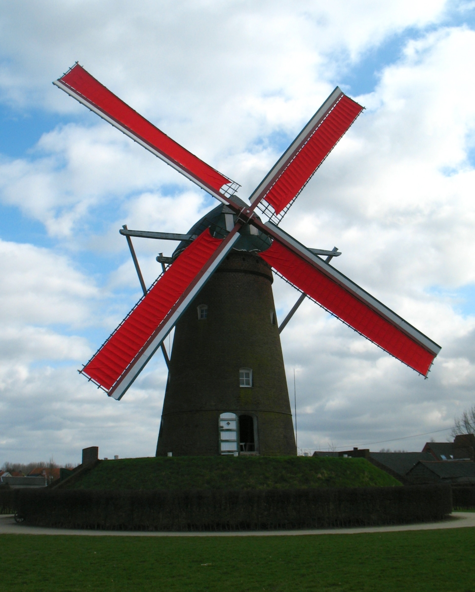 De Stenen Molen te Pulderbos, provincie Antwerpen